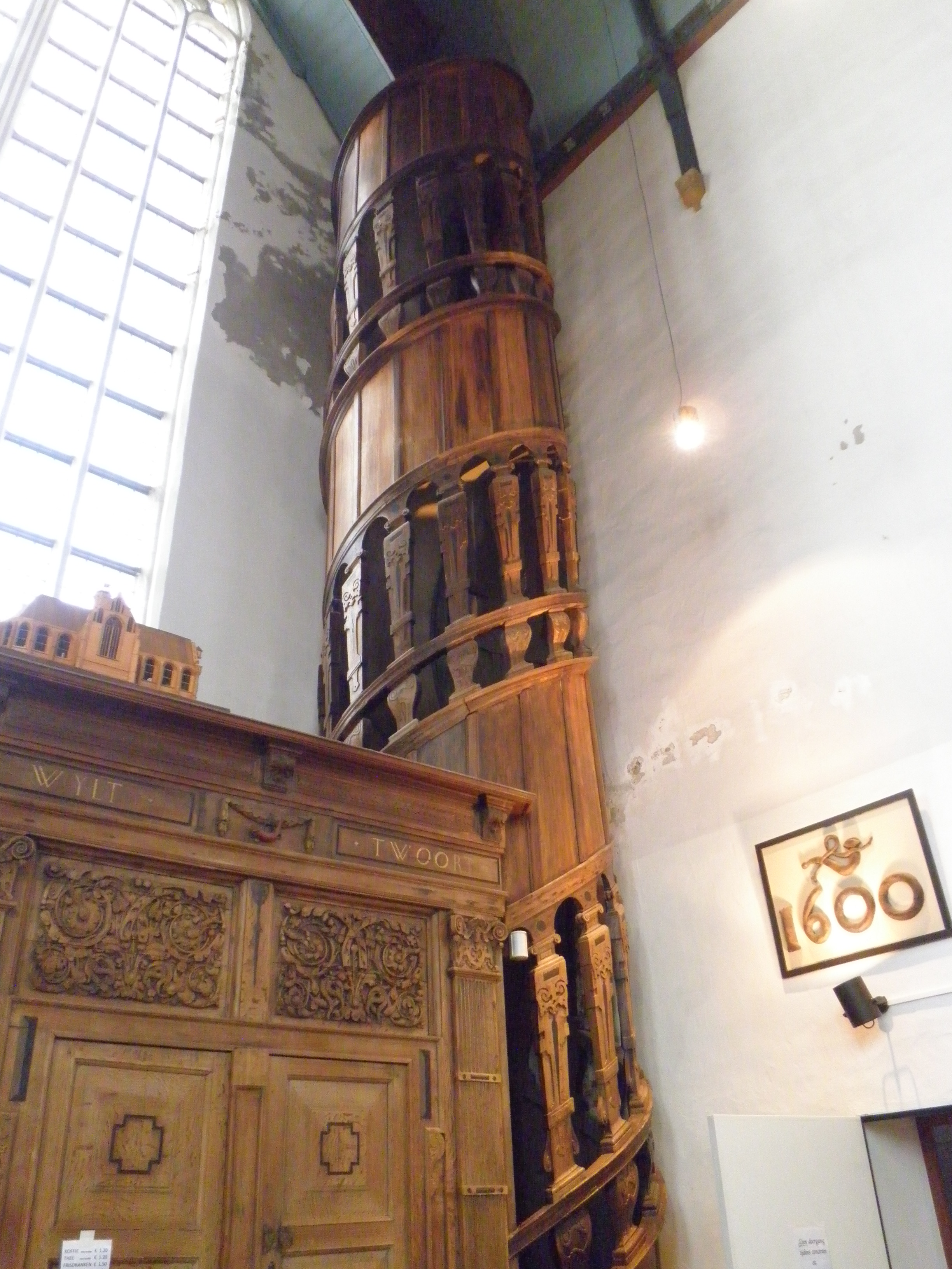 Spiltrap in de Oosterkerk van Hoorn.